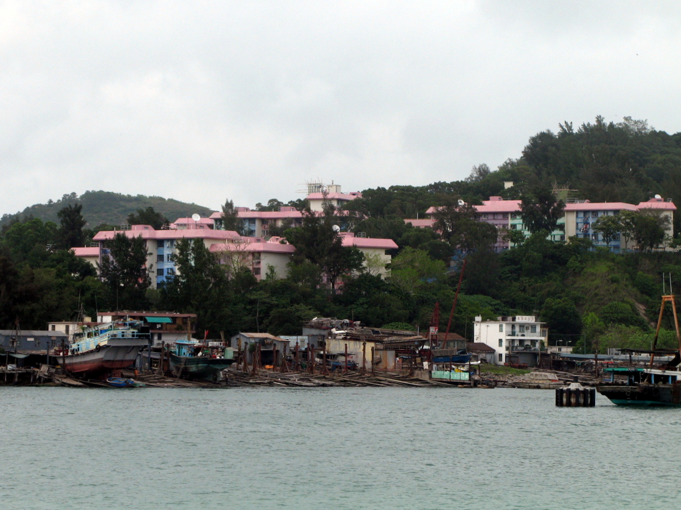 HK Cheung Kwai Estate in Cheung Chou